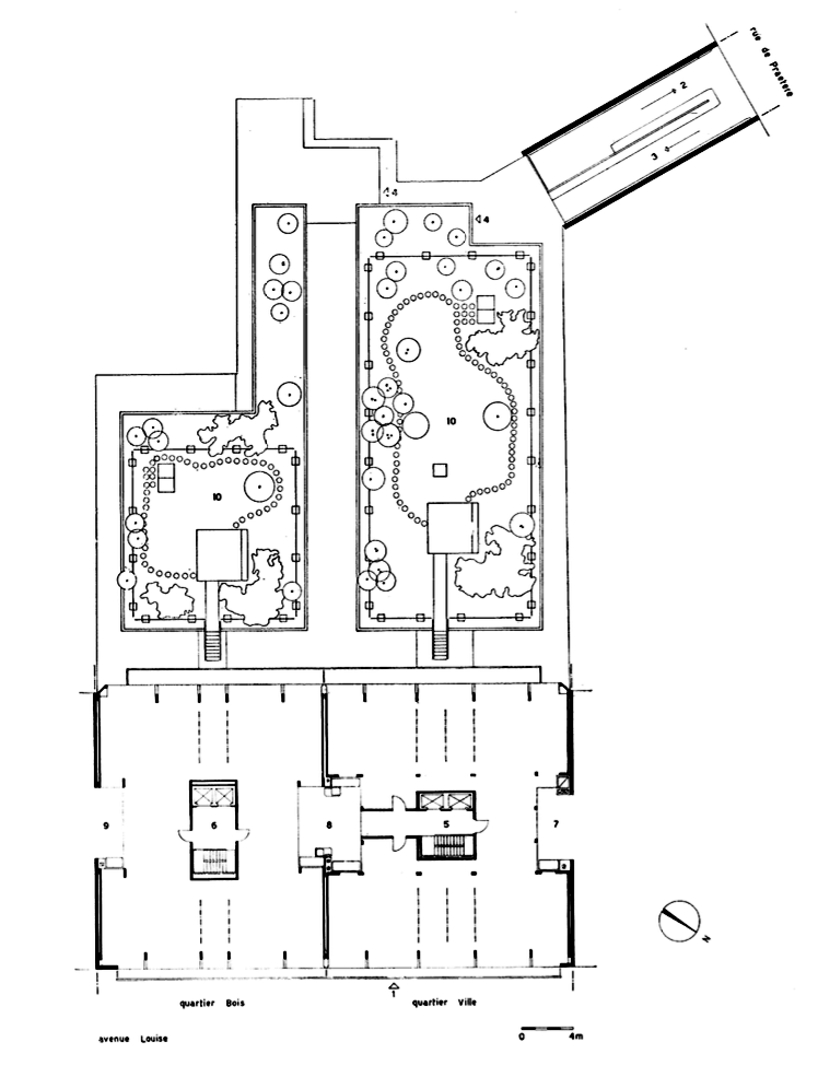 Plan-type d'étage de la résidence Vincennes, système constructif avec poteau béton en retrait, jardin aménagé par Jean Delogne